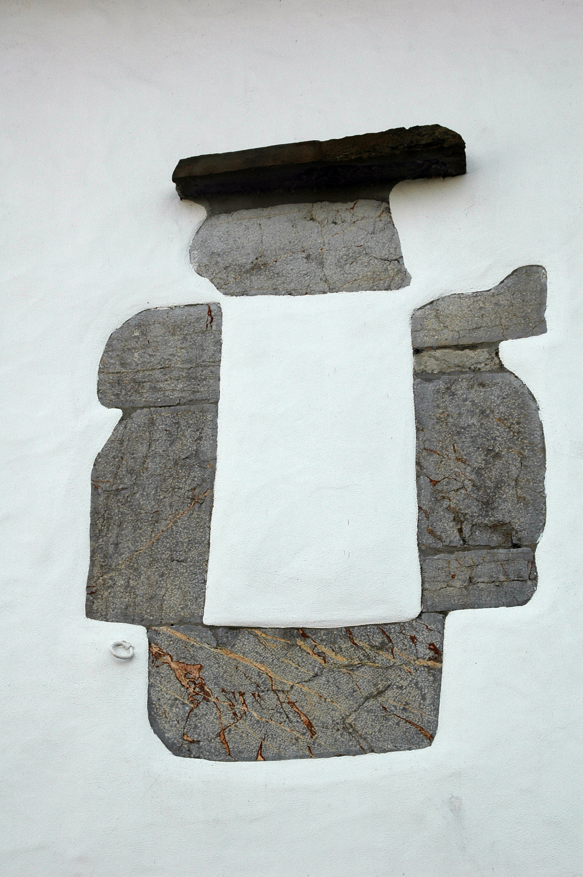 Halsou, fenêtre murée, anciennement protégée contre les pluies de l'ouest. photo prise le 31/12/06 par Harrieta171